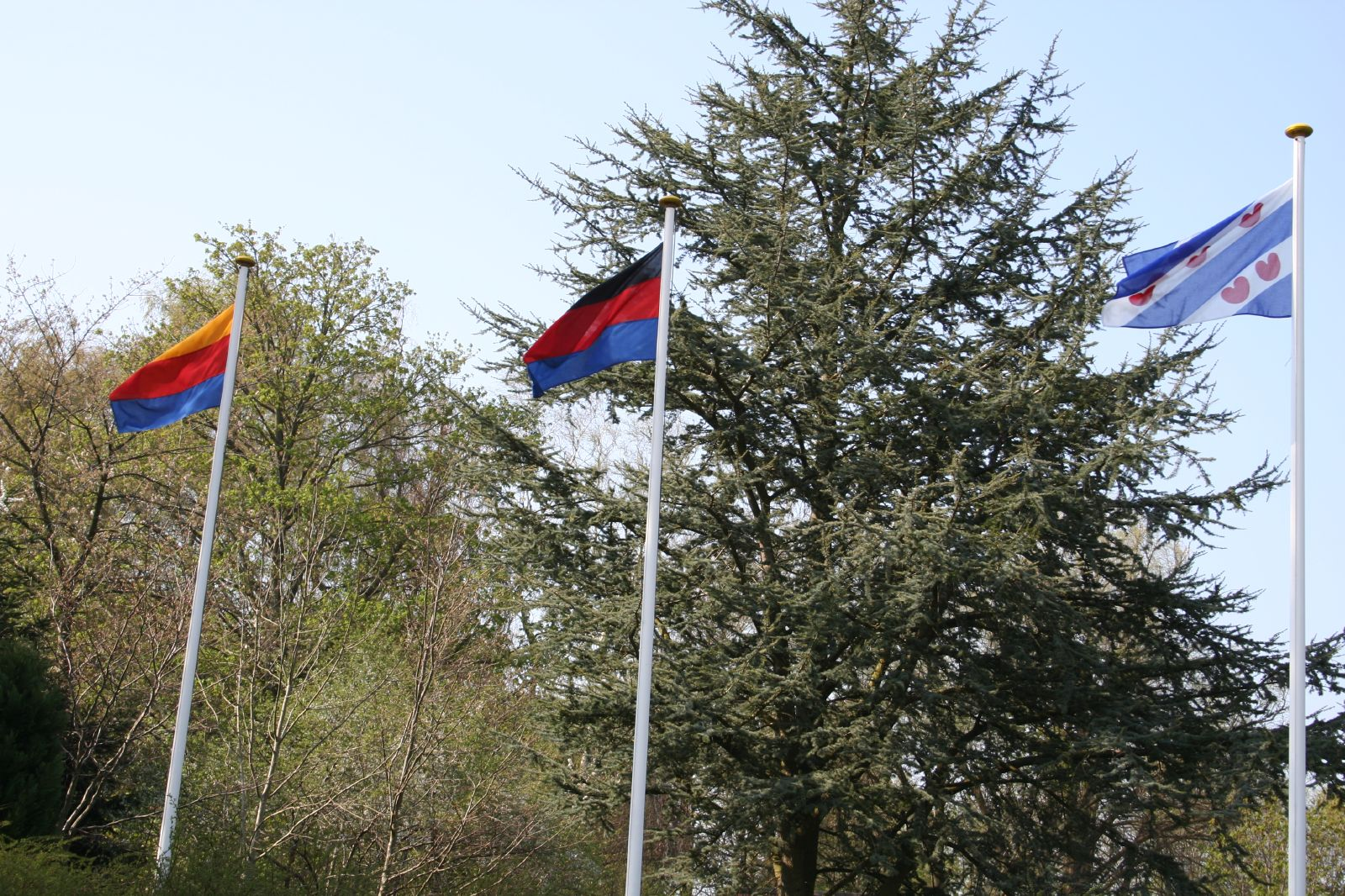 Beflaggung beim Interfriesischen Kongress 2006 in Leck, Nordfriesland. Links die nordfriesische Flagge, in der Mitte die ostfriesische Flagge, rechts die Flagge der Provinz Fryslân.